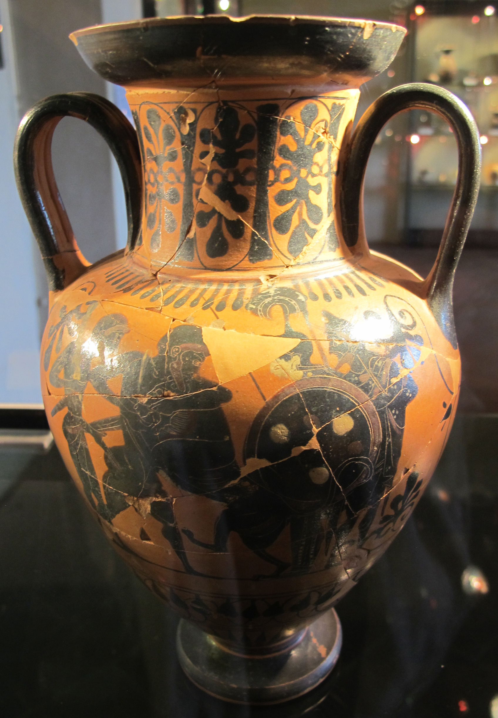 Museo Archeologico Nazionale G.C.Mecenate - MIBAC This is a photo of a monument which is part of cultural heritage of Italy.